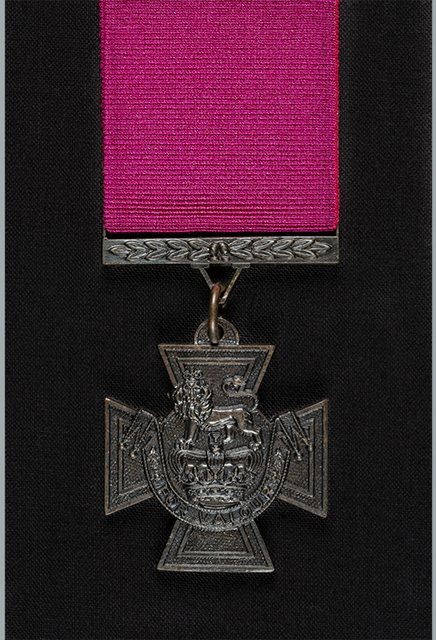 Kapampangan: Krus nang Victoria